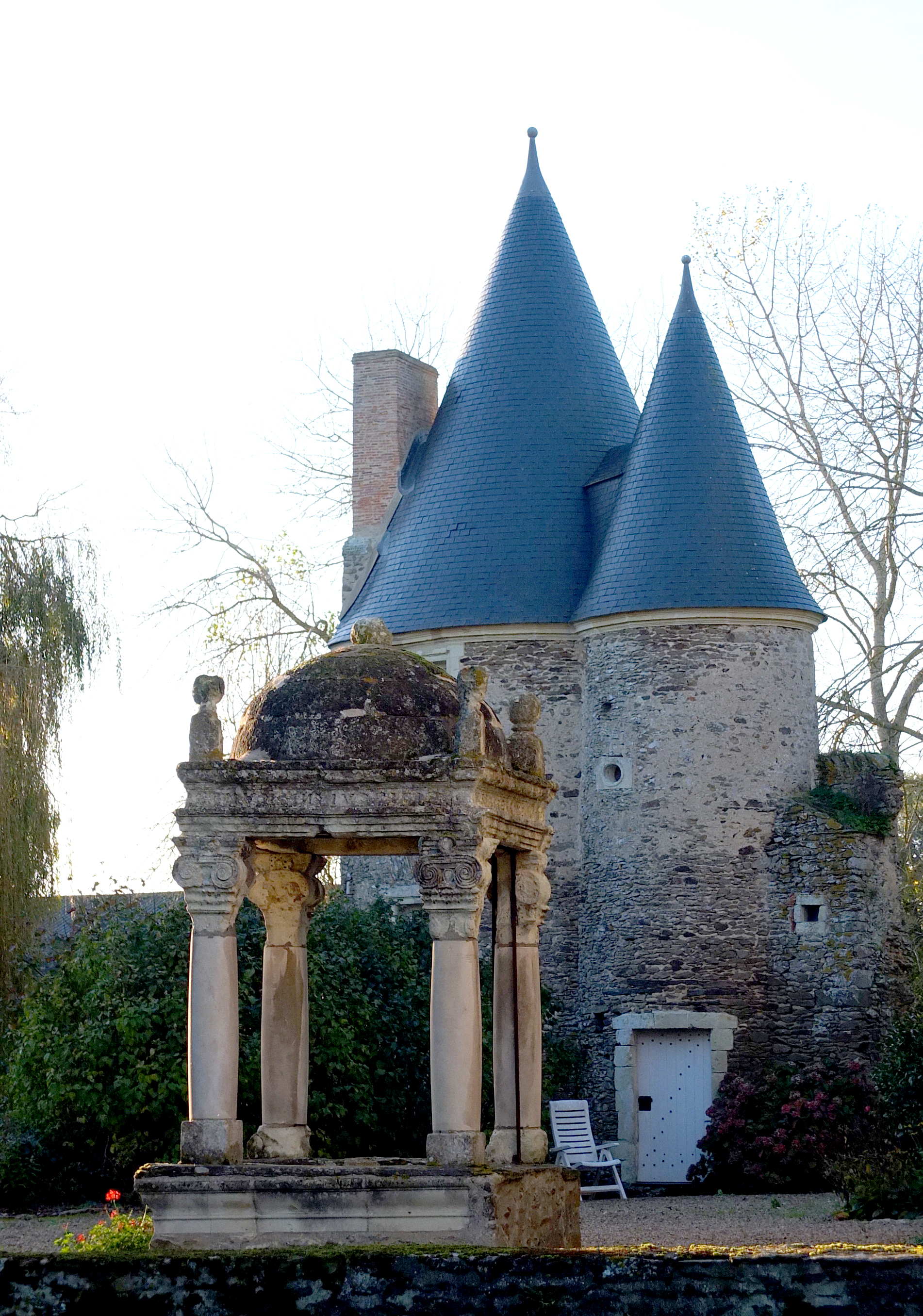 Puits classé du château de l'Escoublère, Daon, Mayenne (53)